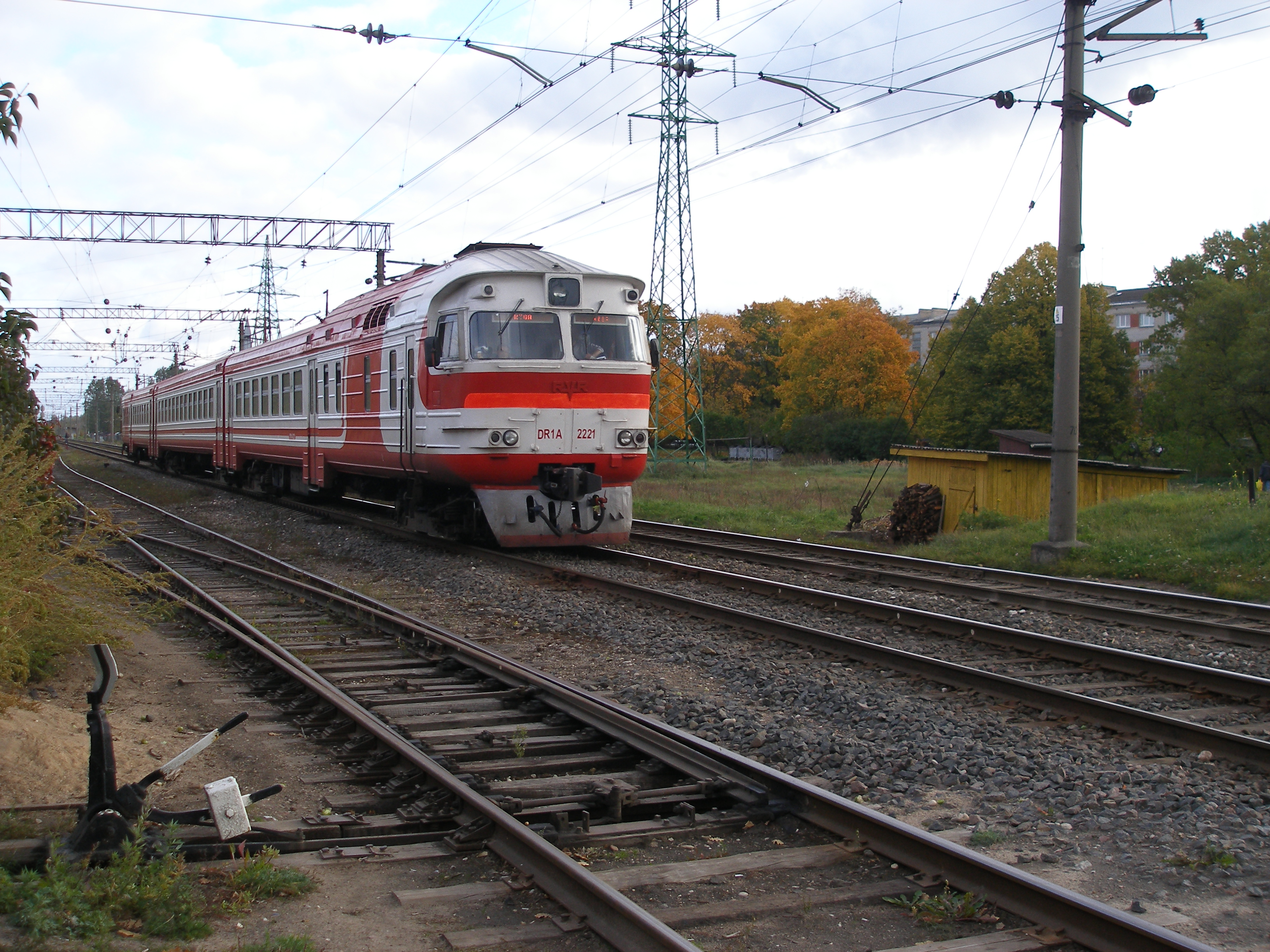 Дизель ДР1А - 222 на участке Чиекуркалнс - Югла